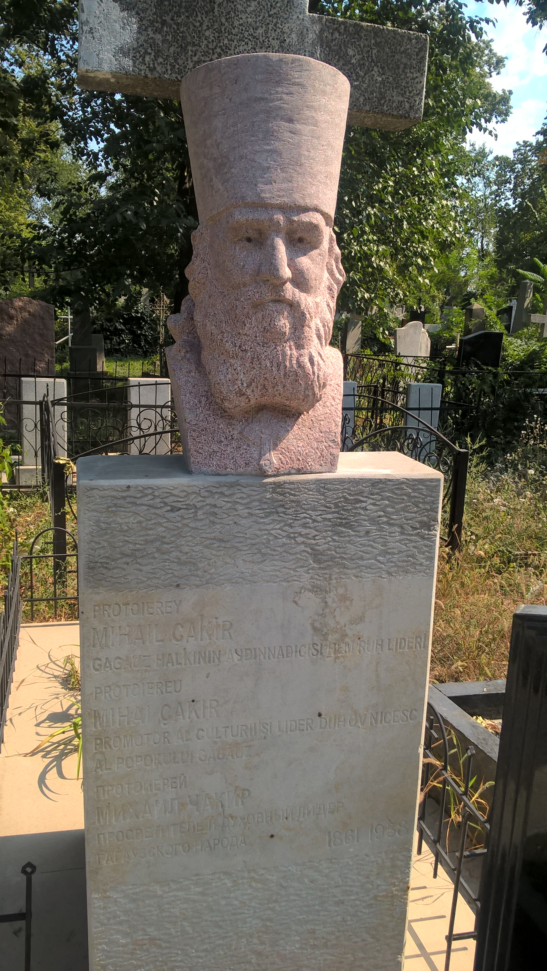 Nagrobek Michaila Cakira na cmentarzu centralnym w Kiszyniowie